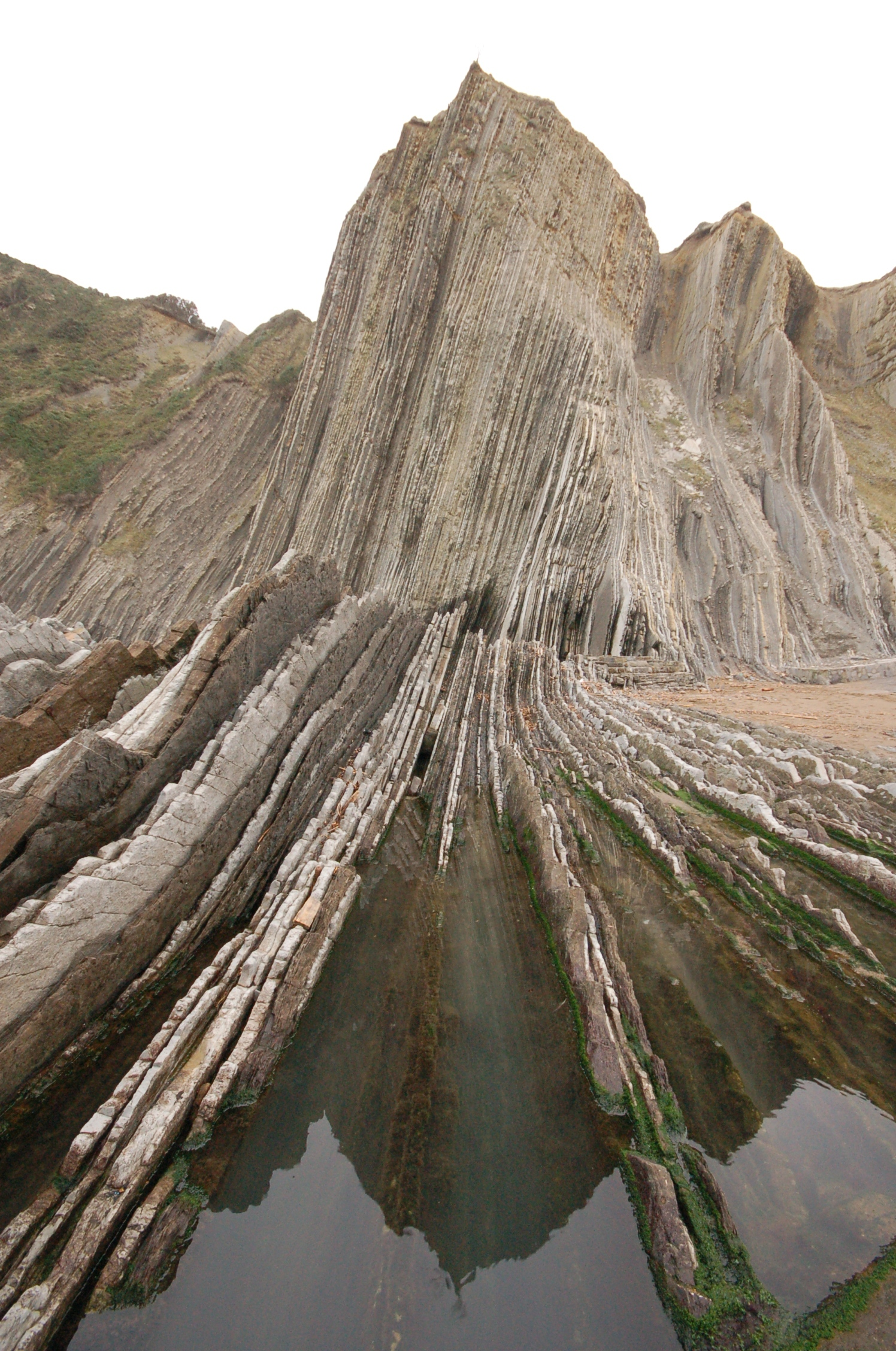 Zumaiako flyscharen irudi bat